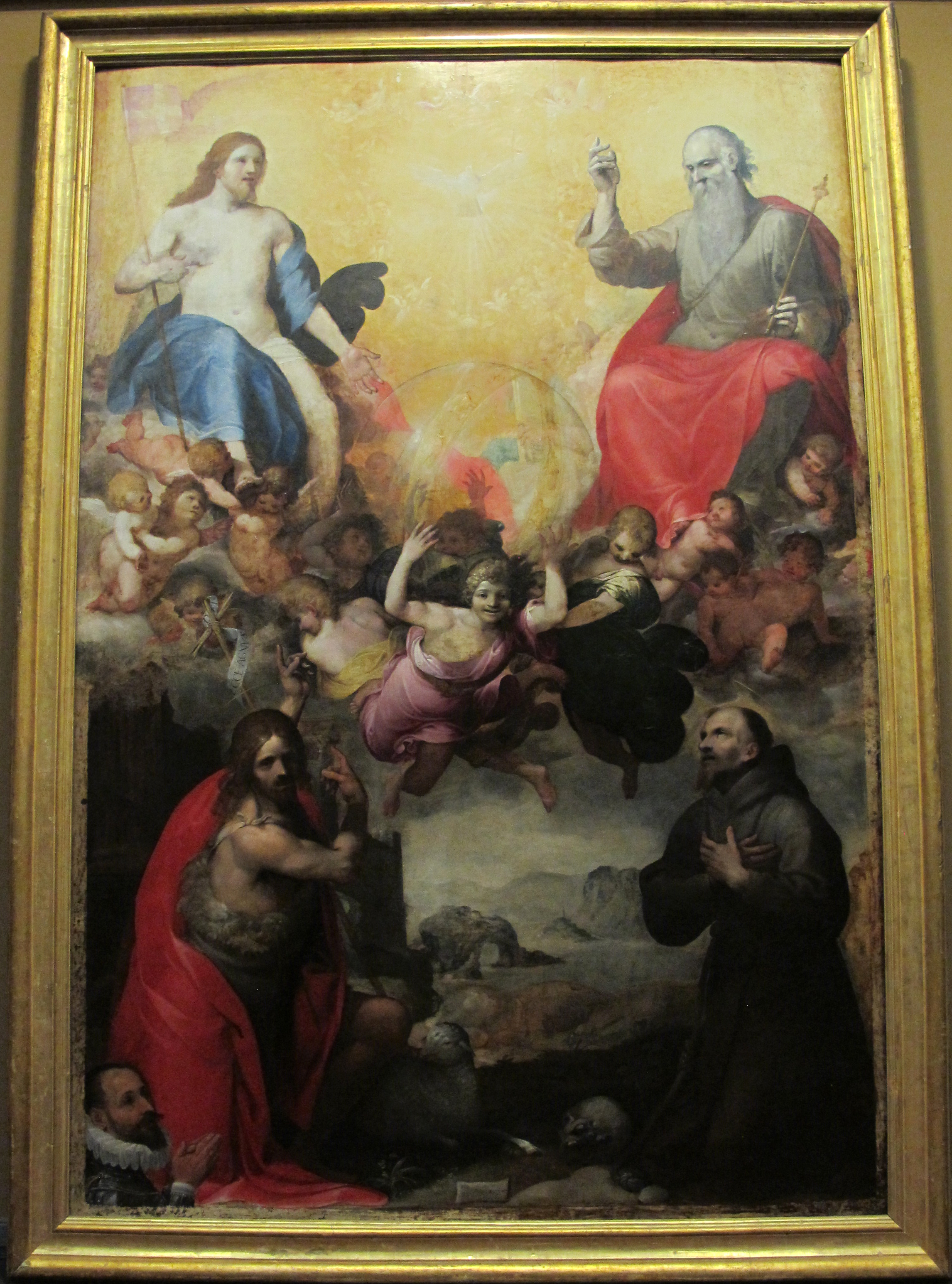 Galleria Napoletana (Museo di Capodimonte)